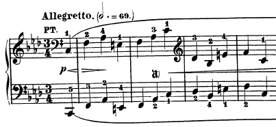 Compassos iniciais do segundo movimento da Sonata para piano n.º 6, Op. 10 nº 2 de Ludwig van Beethoven